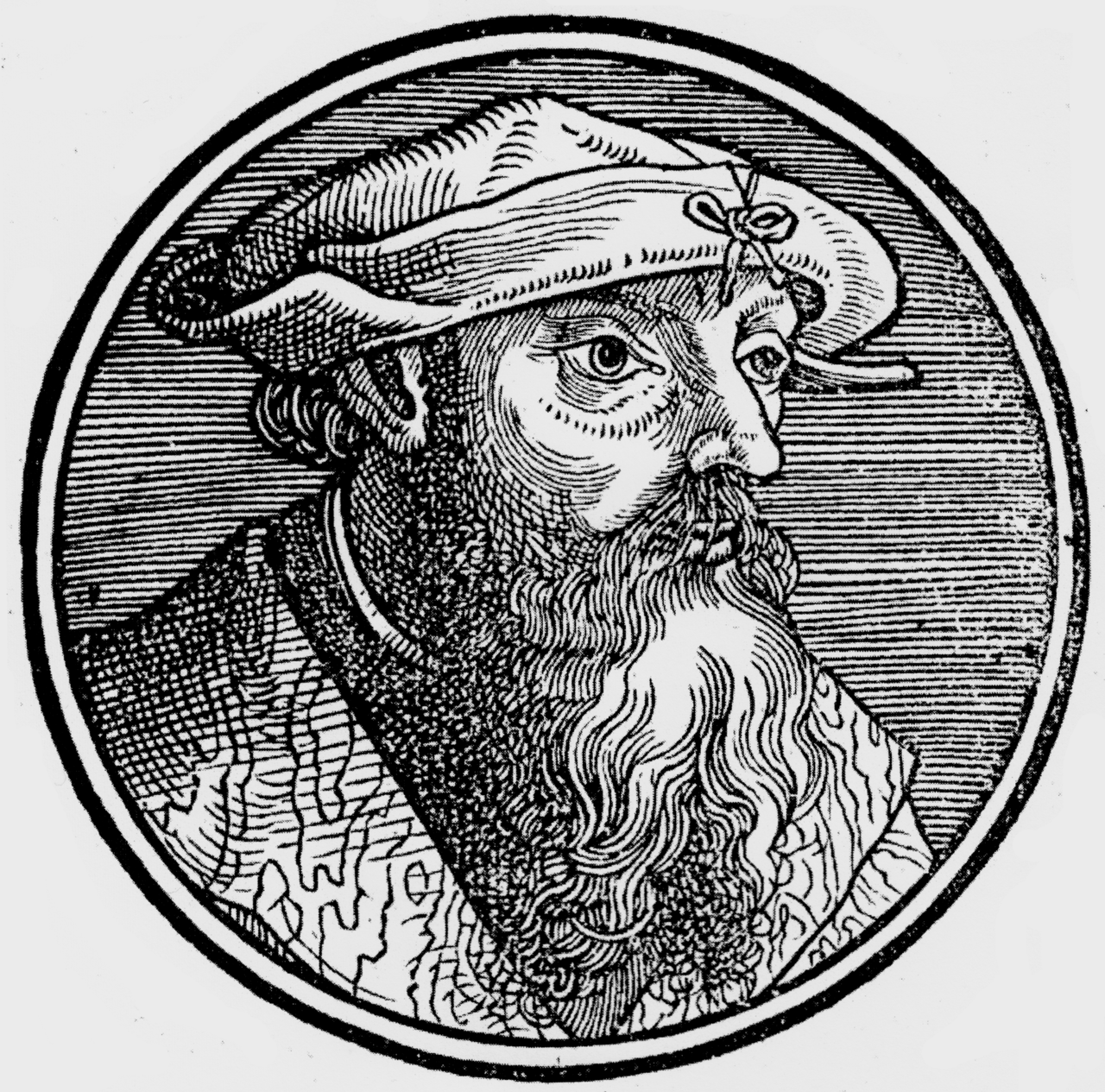 Lorenz Fries (Arzt): Ars memorativa. Straßburg 1523. Autorenbild